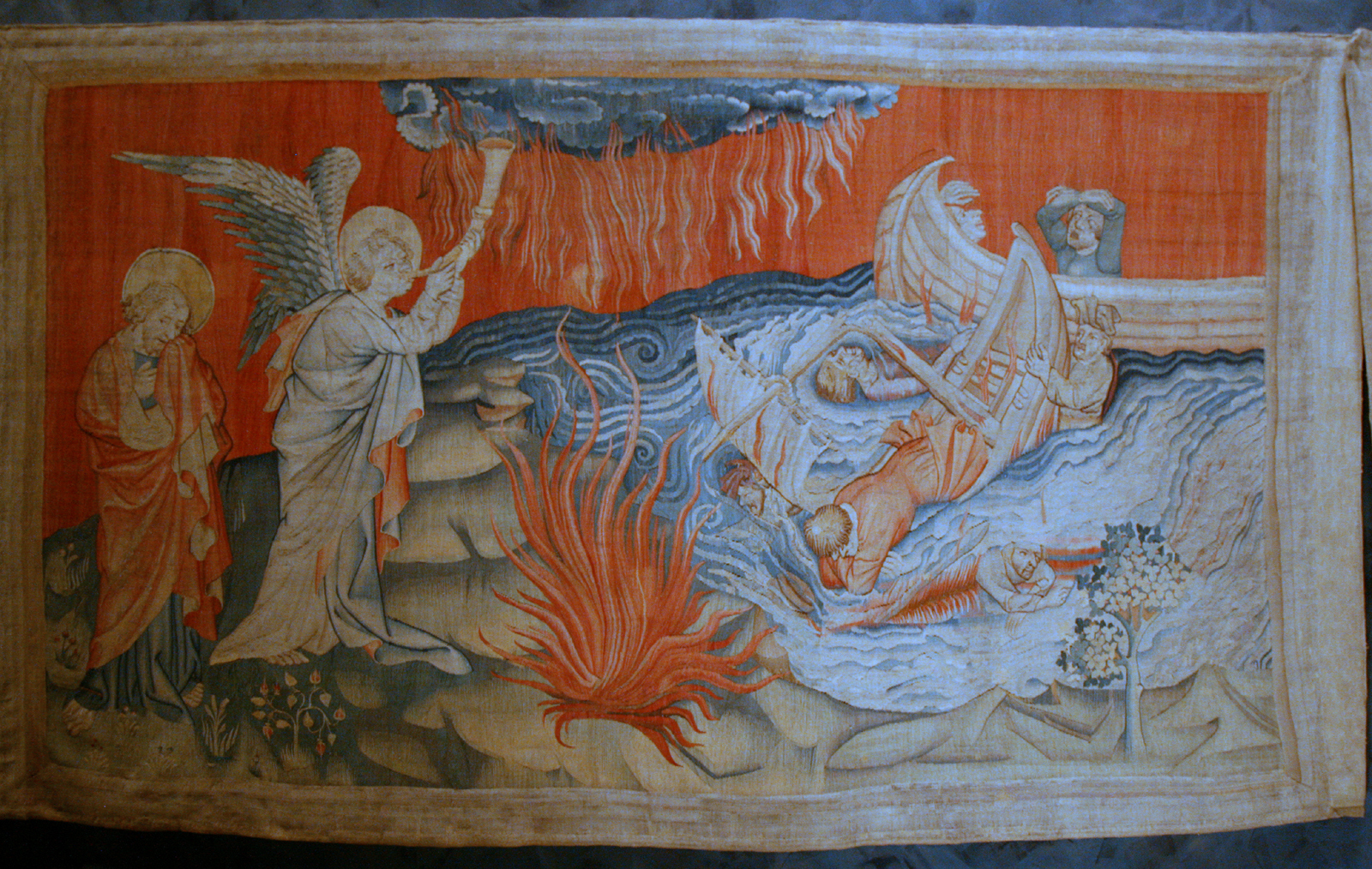 L'Apocalypse au château d'Angers